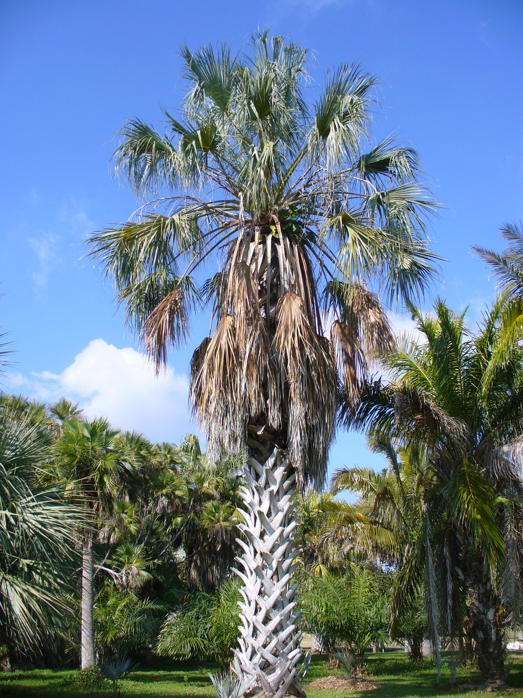 Sabal uresana, Montgomery Botanical Center, Miami, FL, USA.